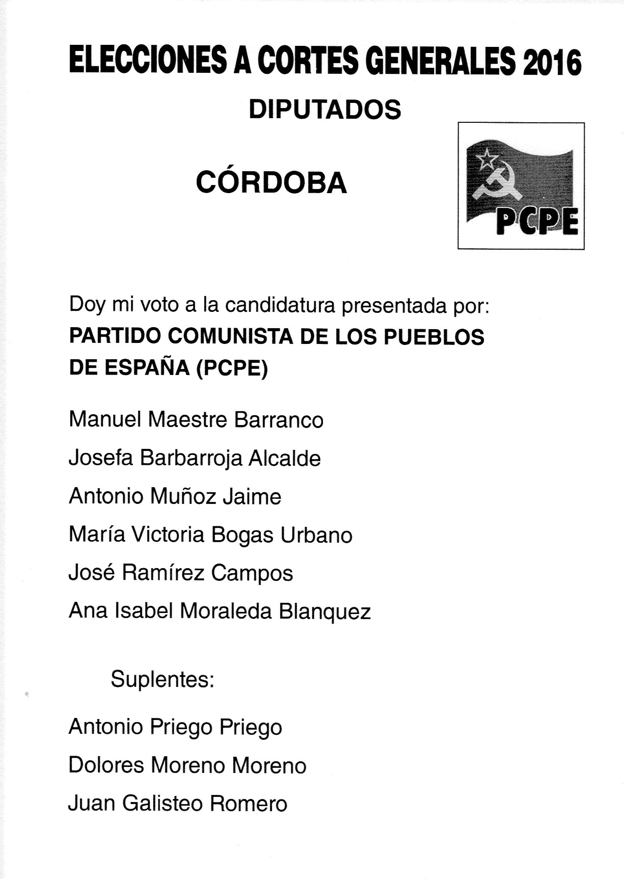 Papeletas electorales de las Elecciones Generales de España de 2016, Córdoba. Partido Comunista de los Pueblos de España.